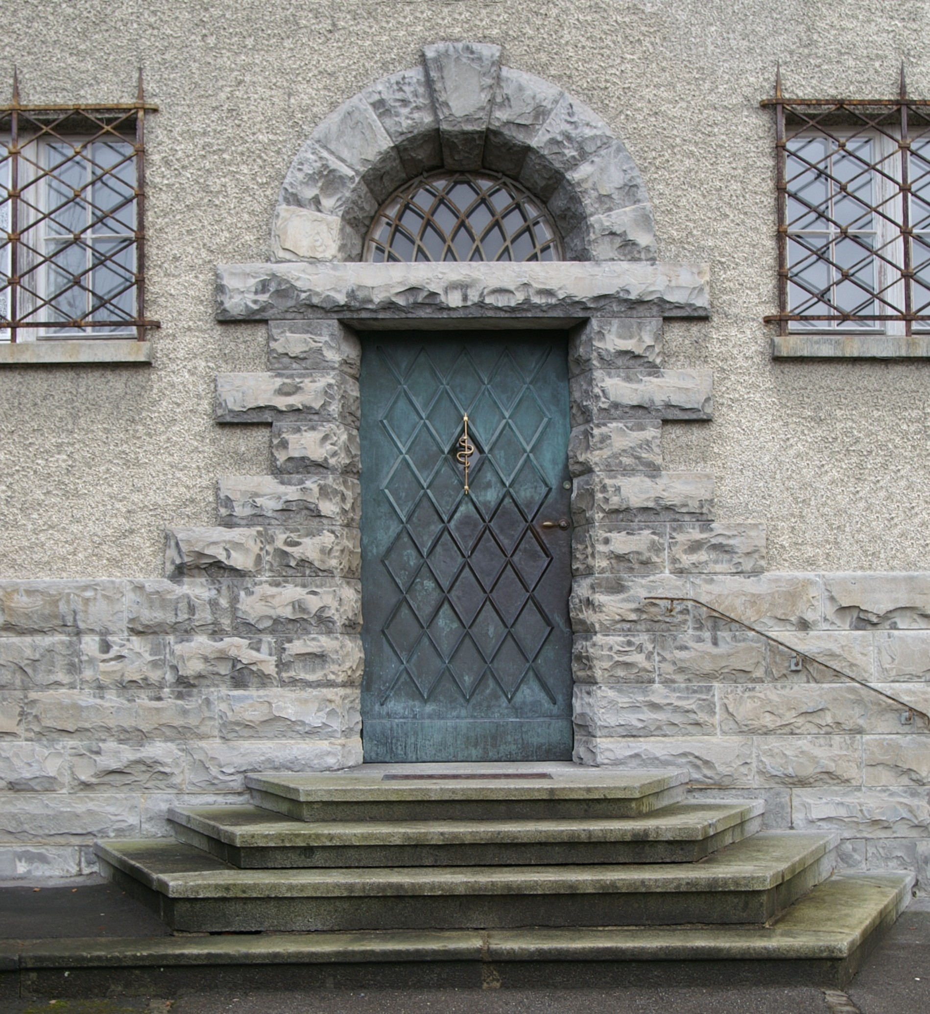 aus dem DEHIO Vorarlberg 1983: Bergmannstrasse Nr.4: Erbaut 1926/27 von Wilhelm Fleisch, hoher Kreuzgiebel, Bruchsteinsockel und -türrahmung. Wohnhaus im Stil der Zwischenkriegszeit / Neuen Sachlichkeit in kubischen Formen. In Dornbirn, Markt.